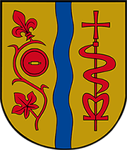 Wappen der Gemeinde Feistritztal, Steiermark